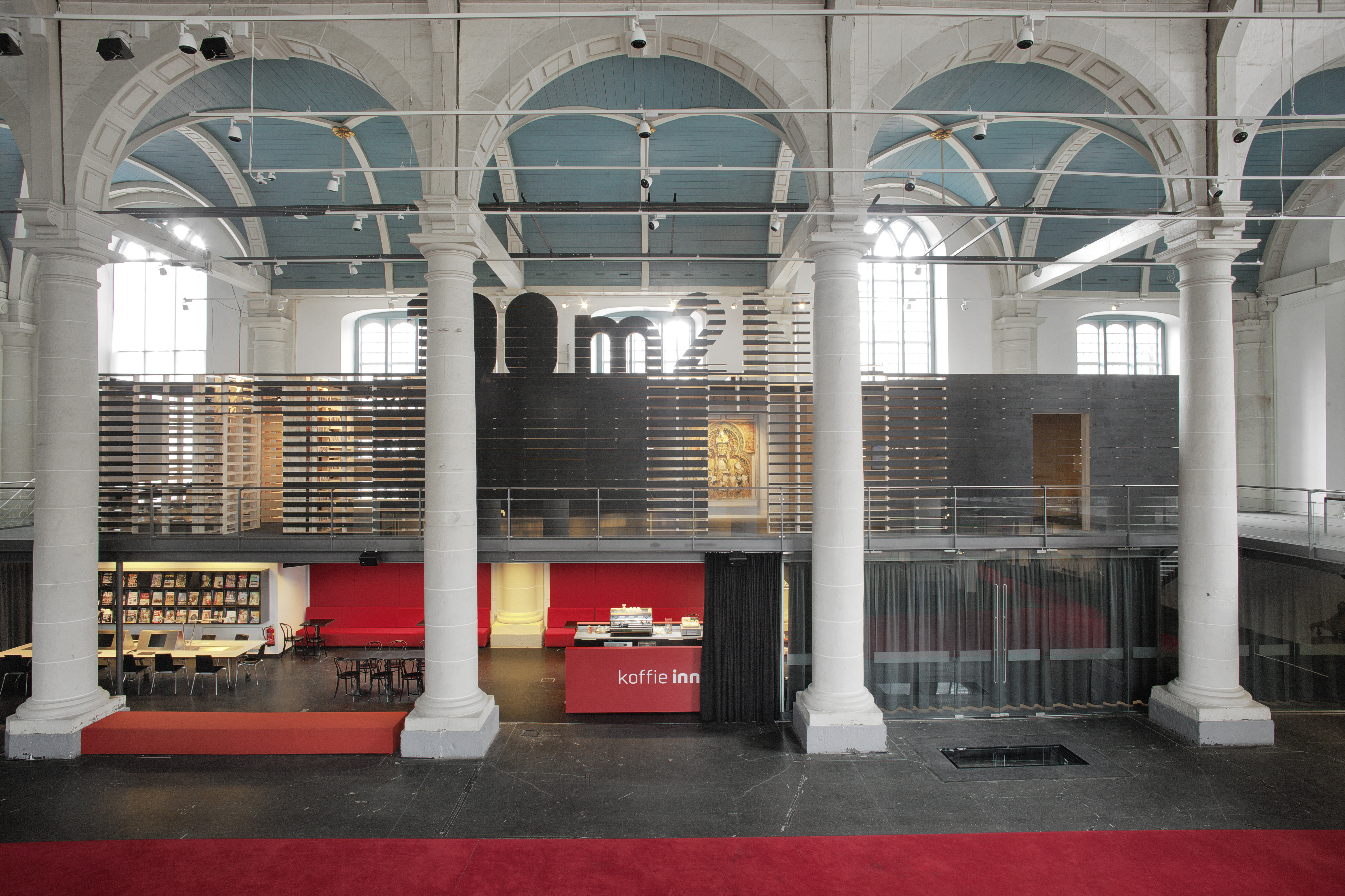 Van 20 mei tot en met 31 augustus 2011 presenteerde het Nationaal Historisch Museum 100m2NL; een compacte overzichtstentoonstelling van de Nederlandse geschiedenis. Fotografie: Erik en Petra Hesmerg